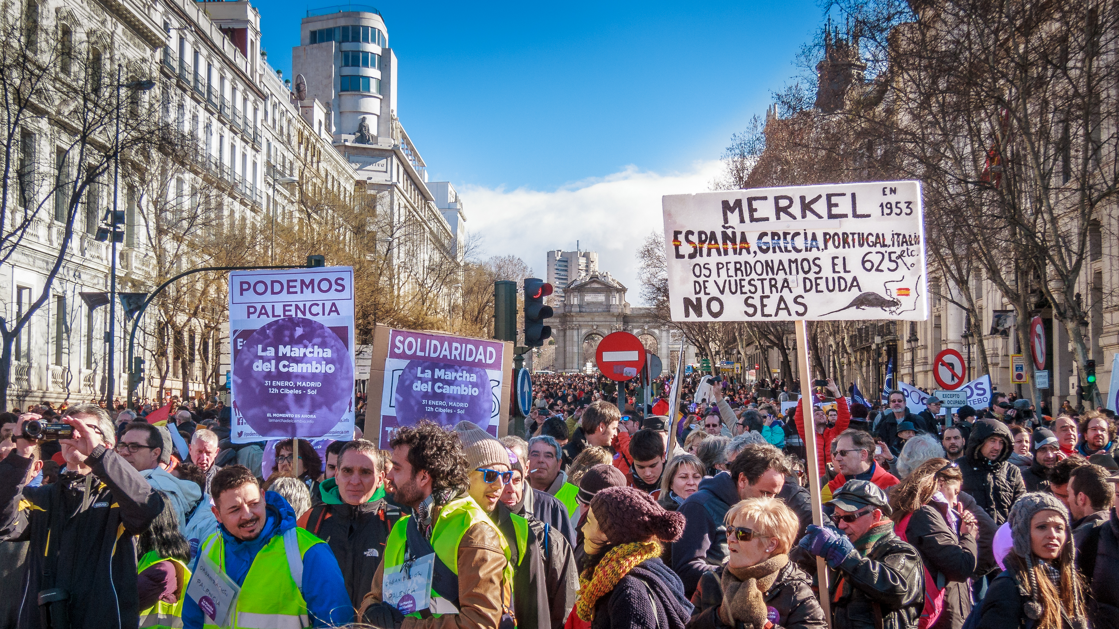 Manifestación del partido Podemos en Madrid, "La marcha del cambio". Vista de la calle de Alcalá desde Cibeles. La pancarta reza: "Merkel, en 1953 España, Grecia, Portugal, Italia, etc. os perdonamos el 62,5% de vuestra deuda. No seas "